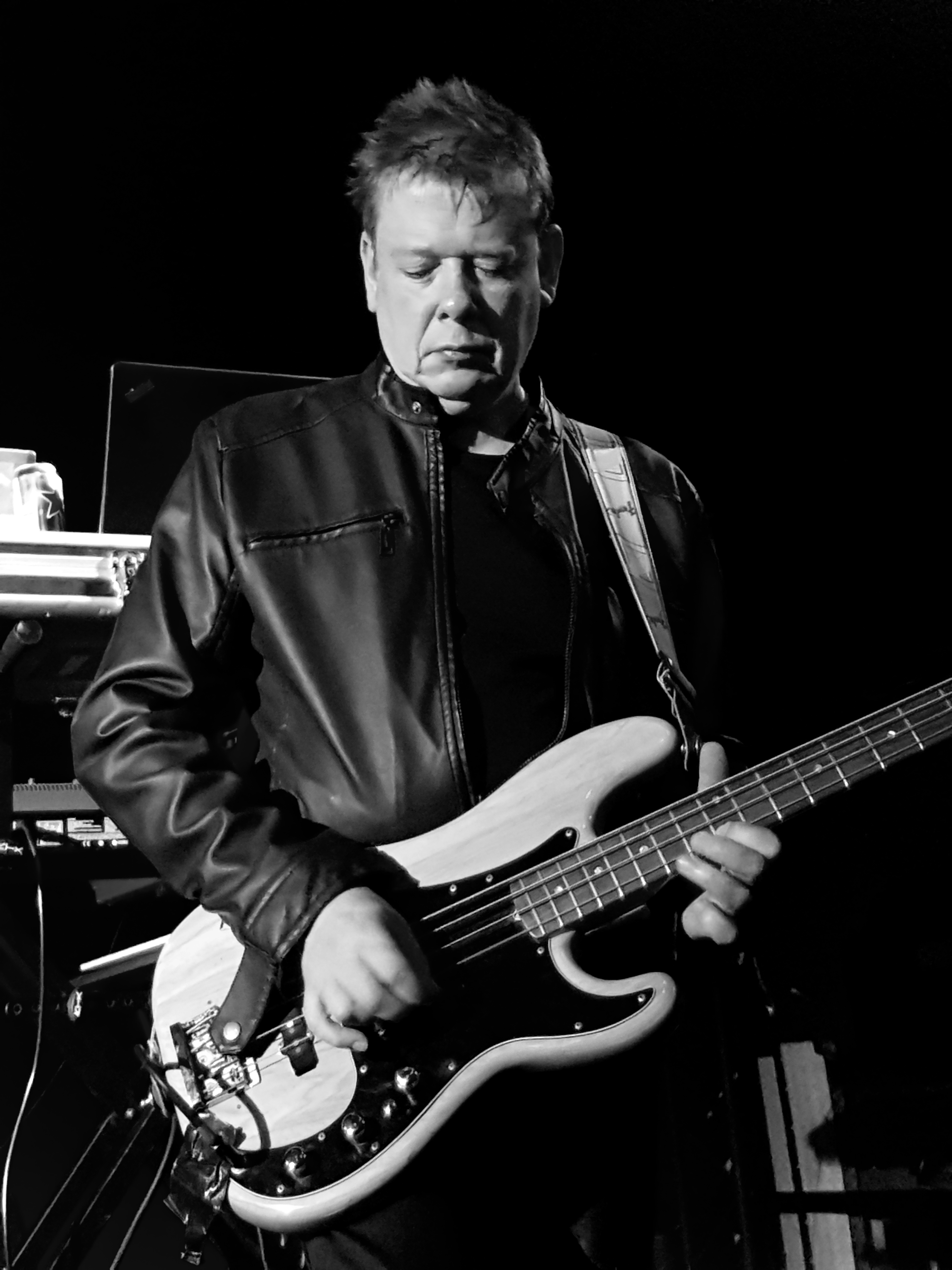 Hervé Lomprez, Trisomie 21, en concert à Strasbourg